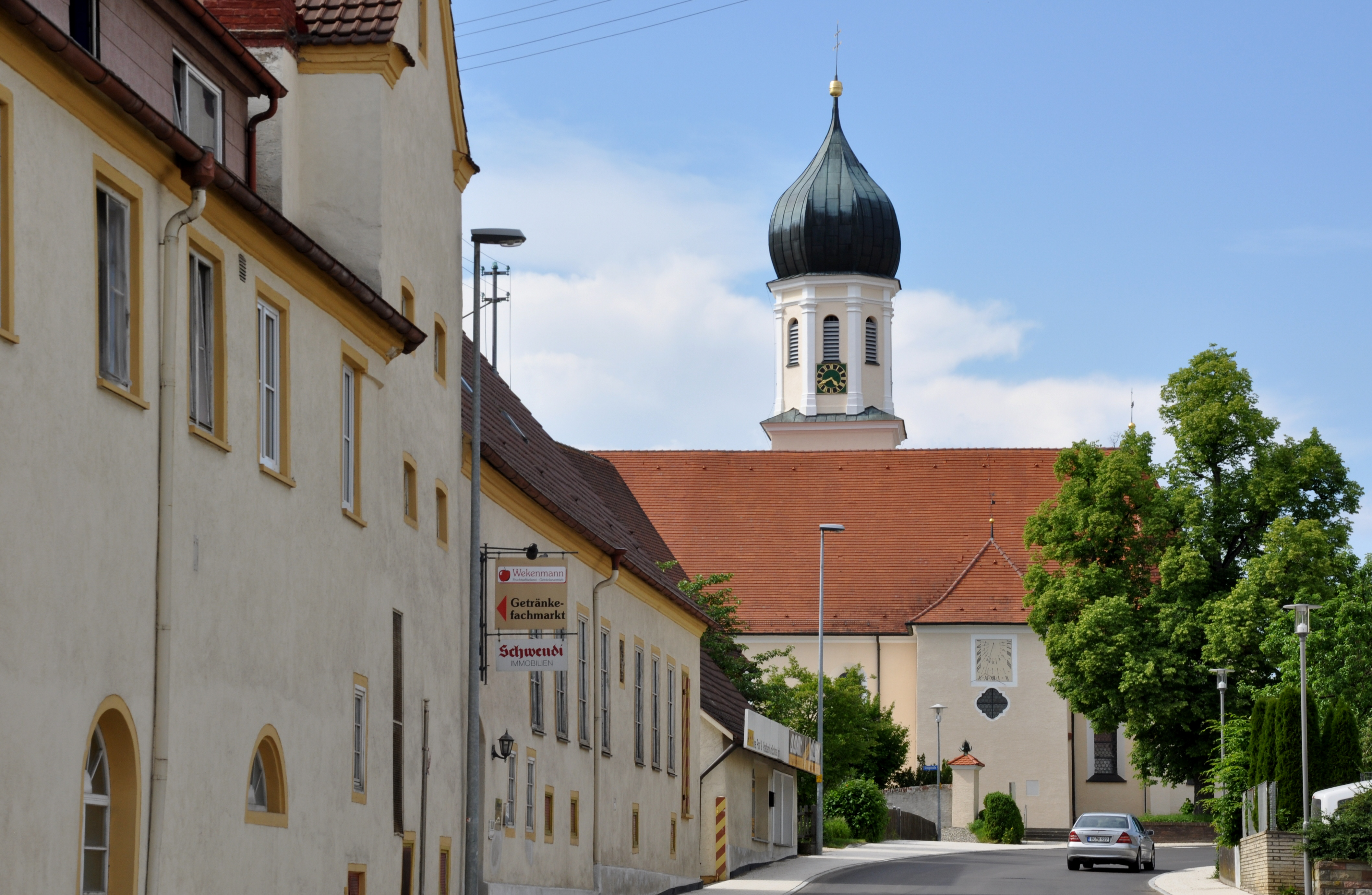 Schwendi (Landkreis Biberach), Kath. Pfarrkirche St. Stephanus, Blick von Süden (links das Gebäudeensemble „Schlosshof“)